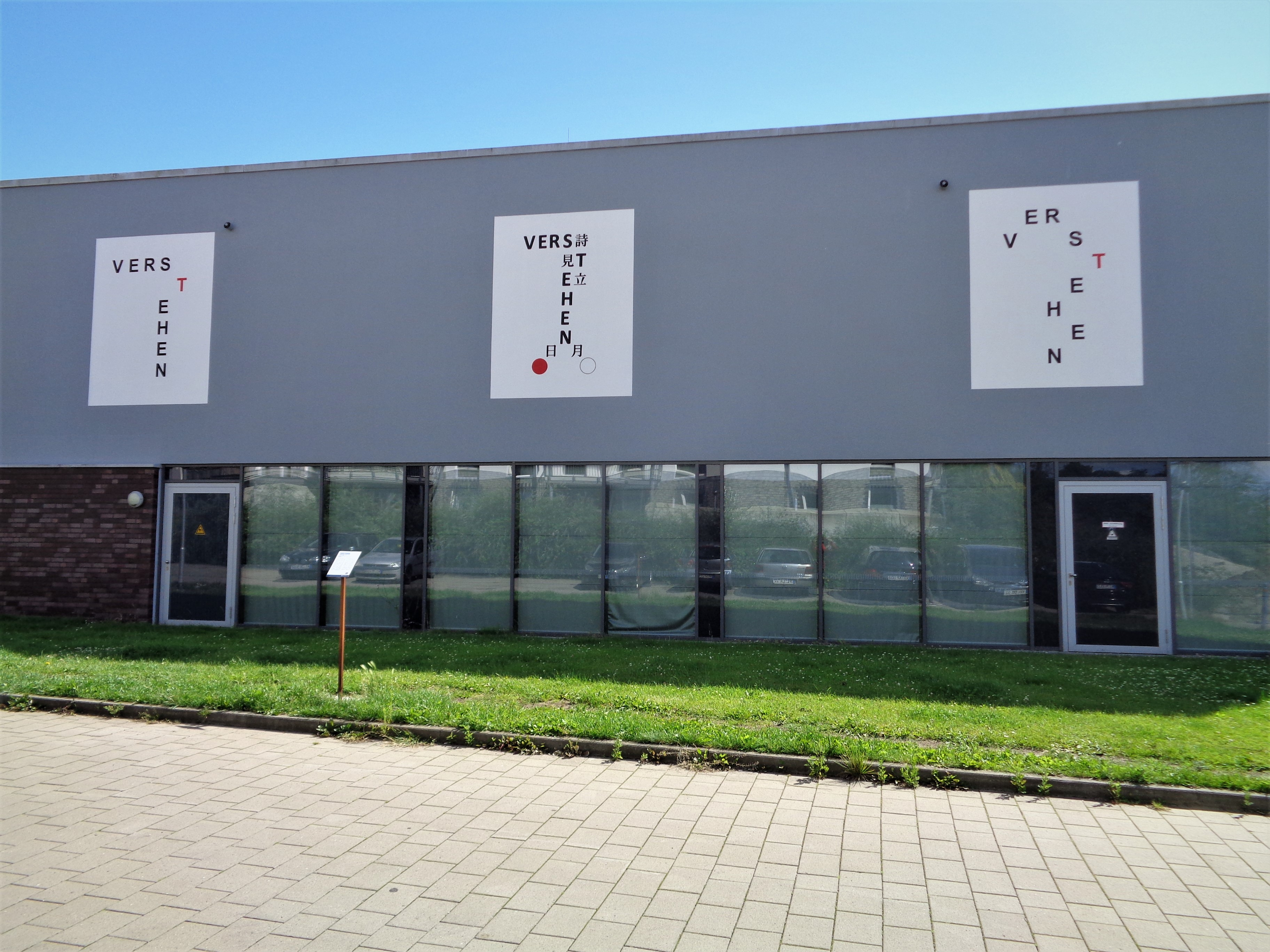 Dreiteiliges Werk des Künstlers Klaus Peter Dencker an der Nordseite des Mehrzweckgebäudes der Fachhochschule in Kiel-Dietrichsdorf. Das Werk entstand in den Jahren 1969, 2005 und 2018.